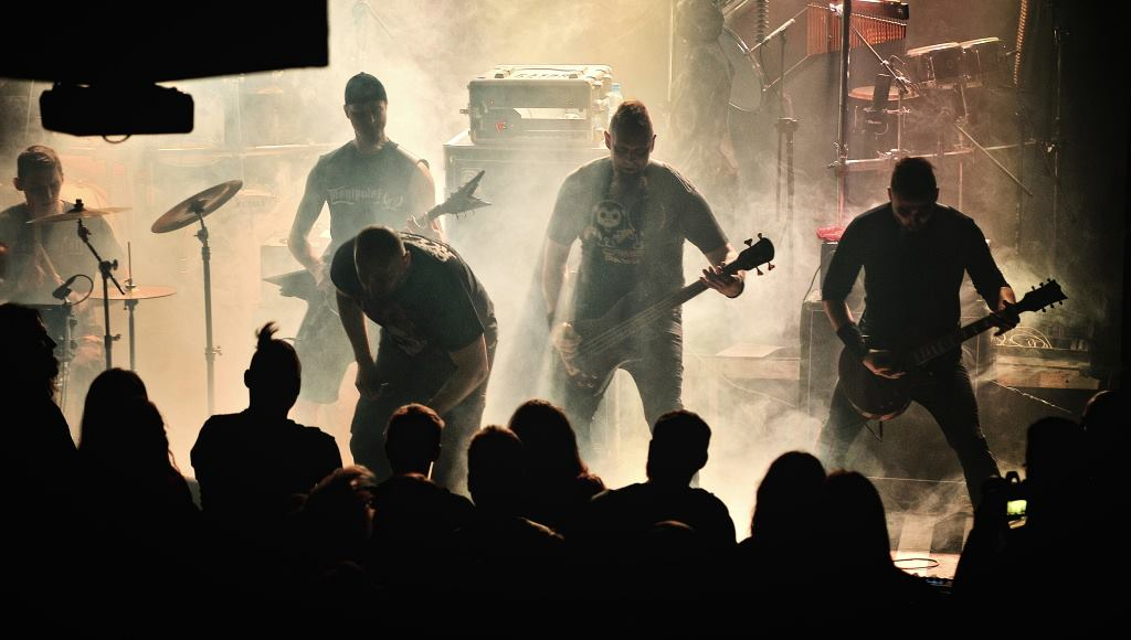 EmpatiC podczas koncertu w Białymstoku, 2017